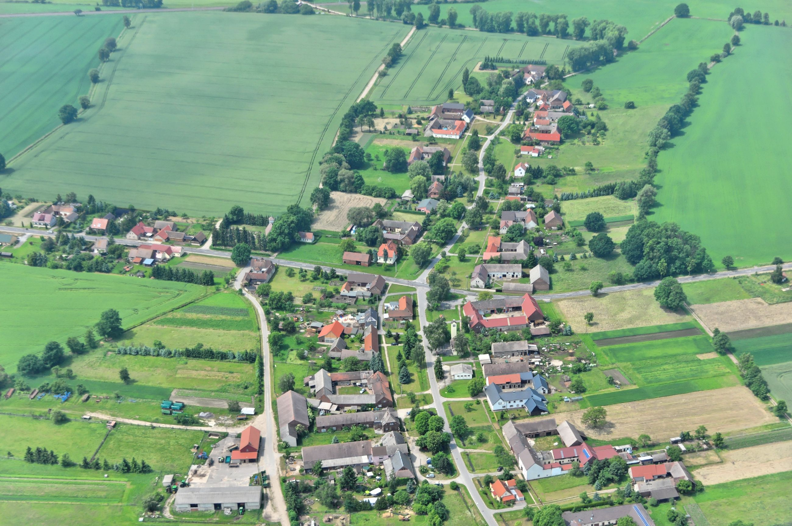 Überführungsflug vom Flugplatz Schwarzheide-Schipkau über Potsdam, Lüneburg zum Flugplatz Nordholz-Spieka